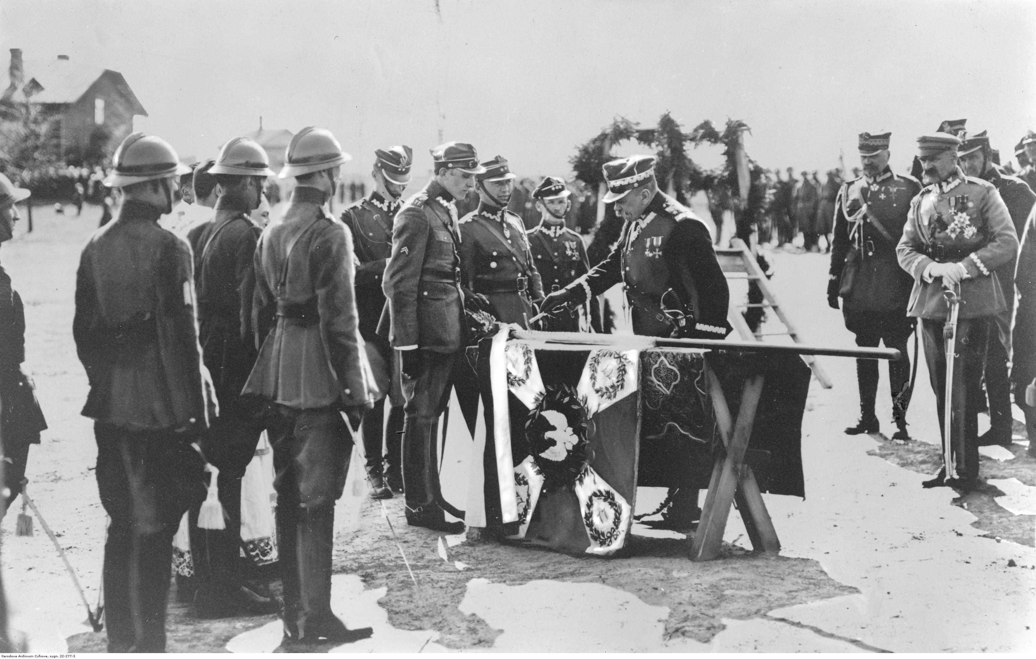 Józef Piłsudski (1. z prawej) w trakcie poświęcenia sztandaru. Widoczny także m.in. gen. Daniel Konarzewski (na lewo od marszałka).